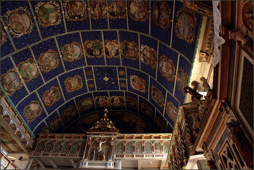 Wnętrze kościoła w Klępsku, fragment polichromii na suficie Fot: Grzegorz Koprowicz